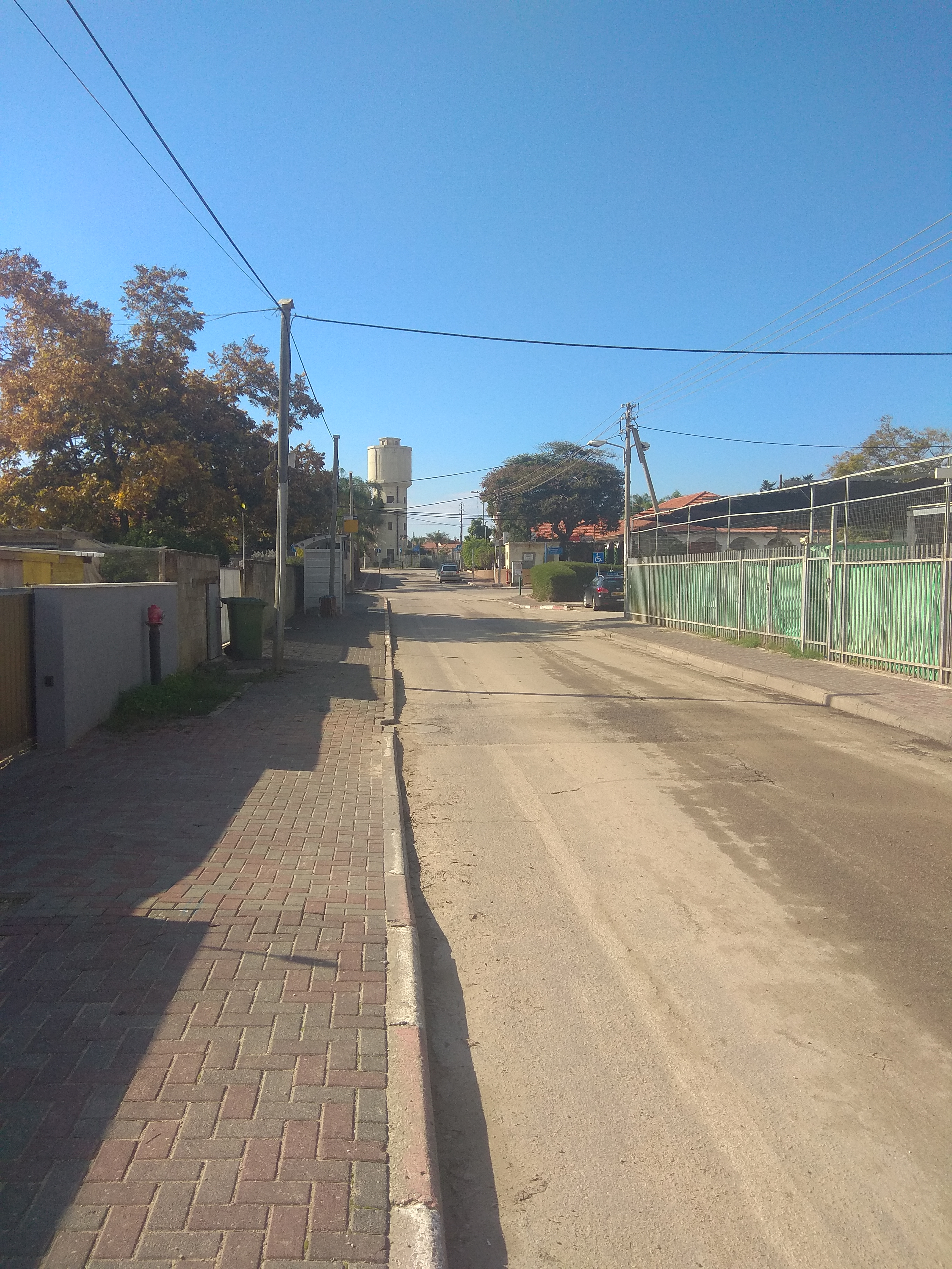 שדרות אהרונוביץ'